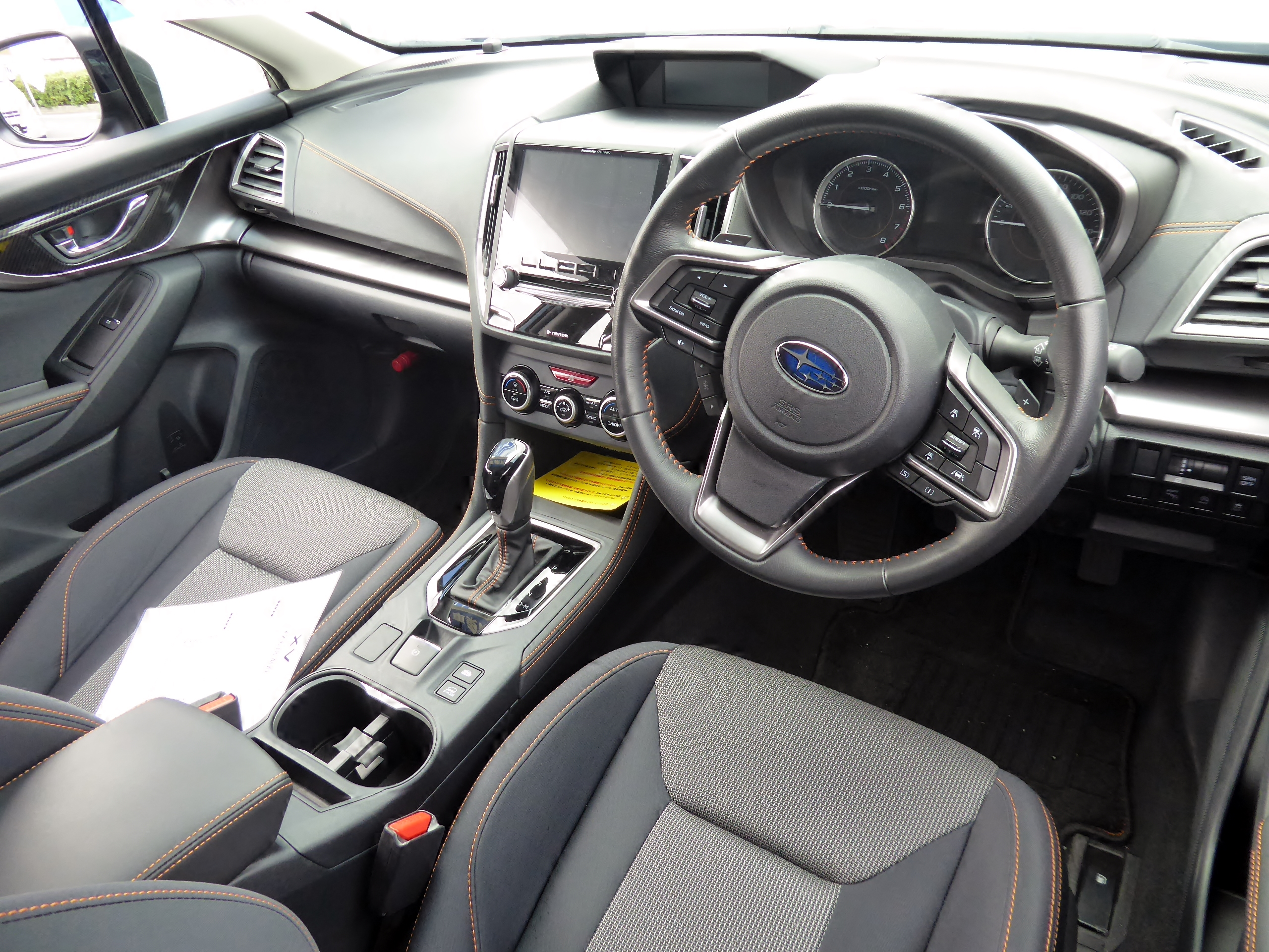 DBA-GT7型スバル・XV 2.0i-L EyeSightのインテリアを撮影。